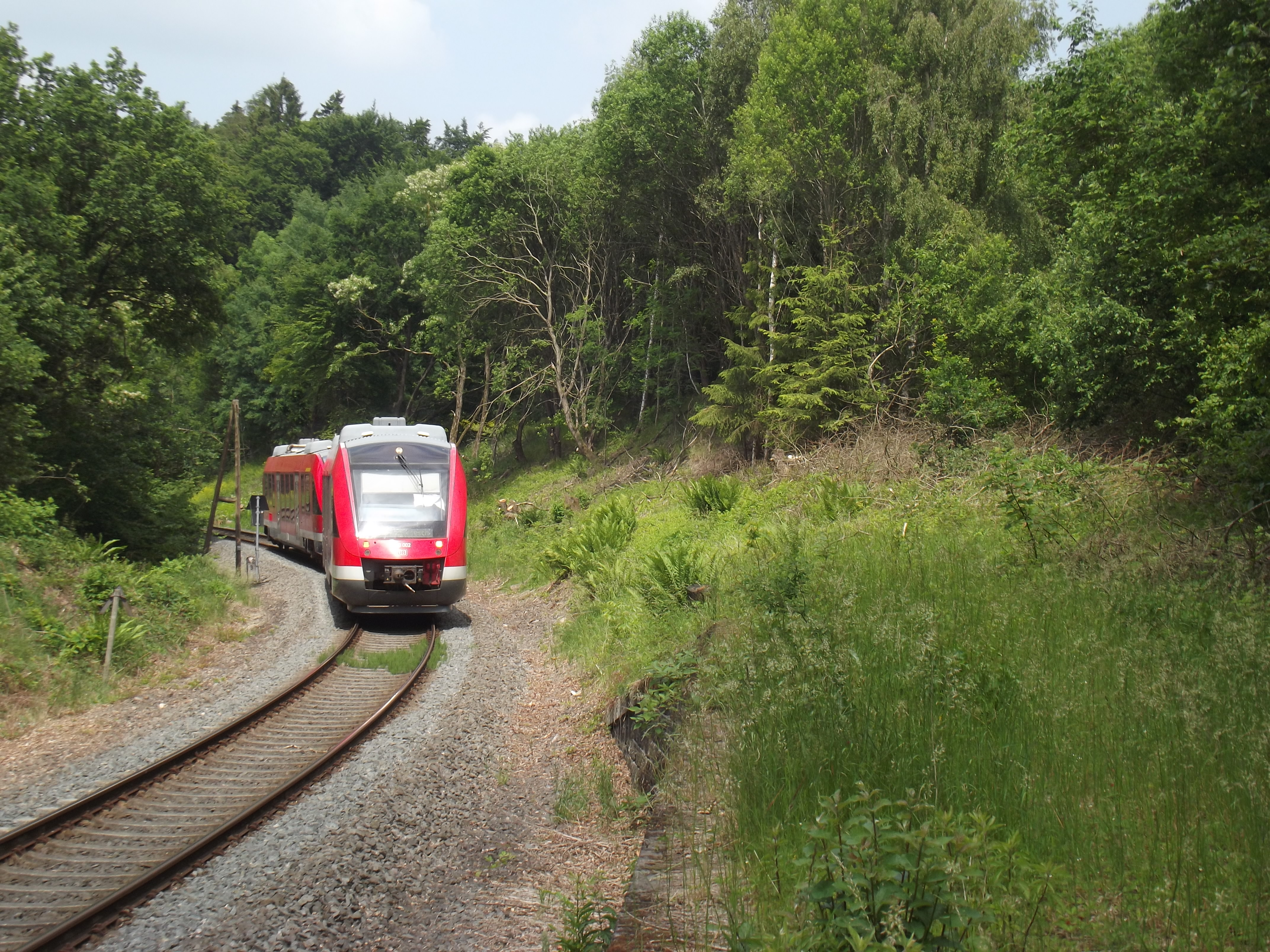 Binnenkomende trein in Kaisersesch